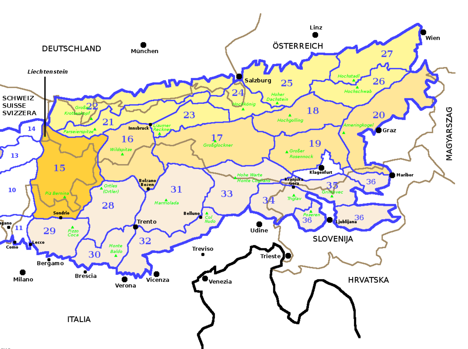 Alpi Orientali secondo la SOIUSA con evidenziate le Alpi Retiche Occidentali